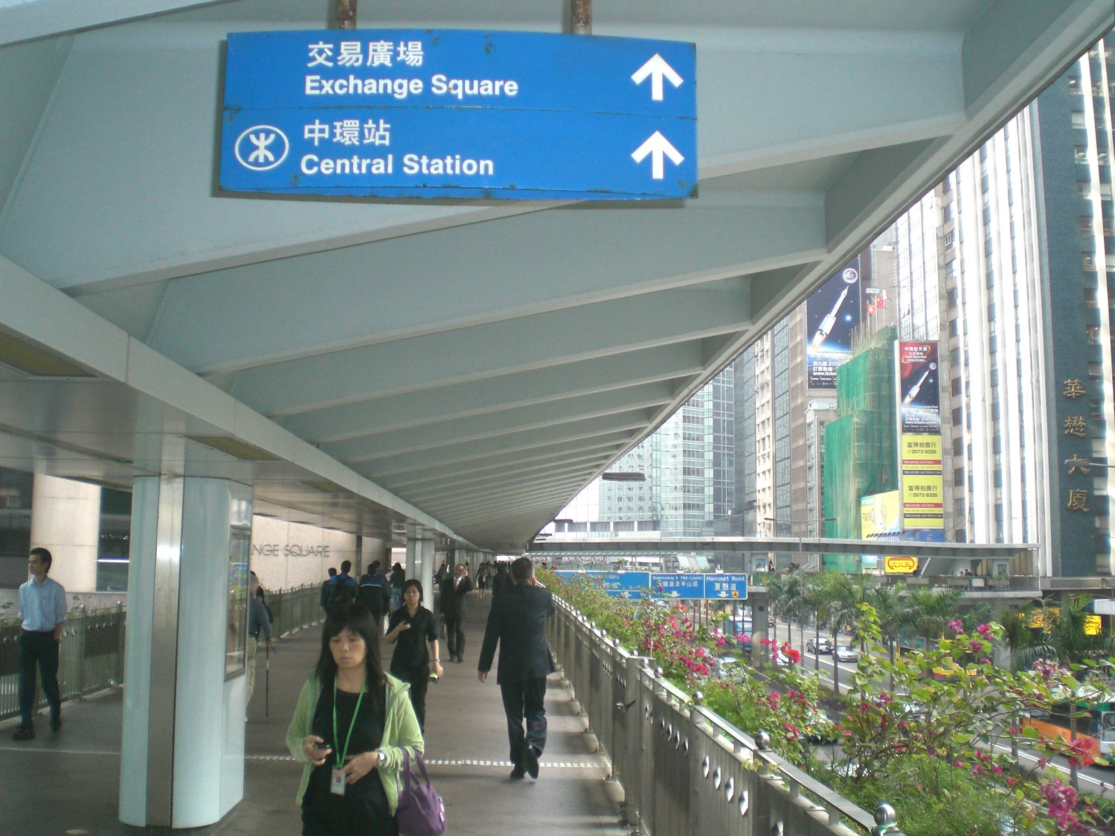 中區行人天橋系統